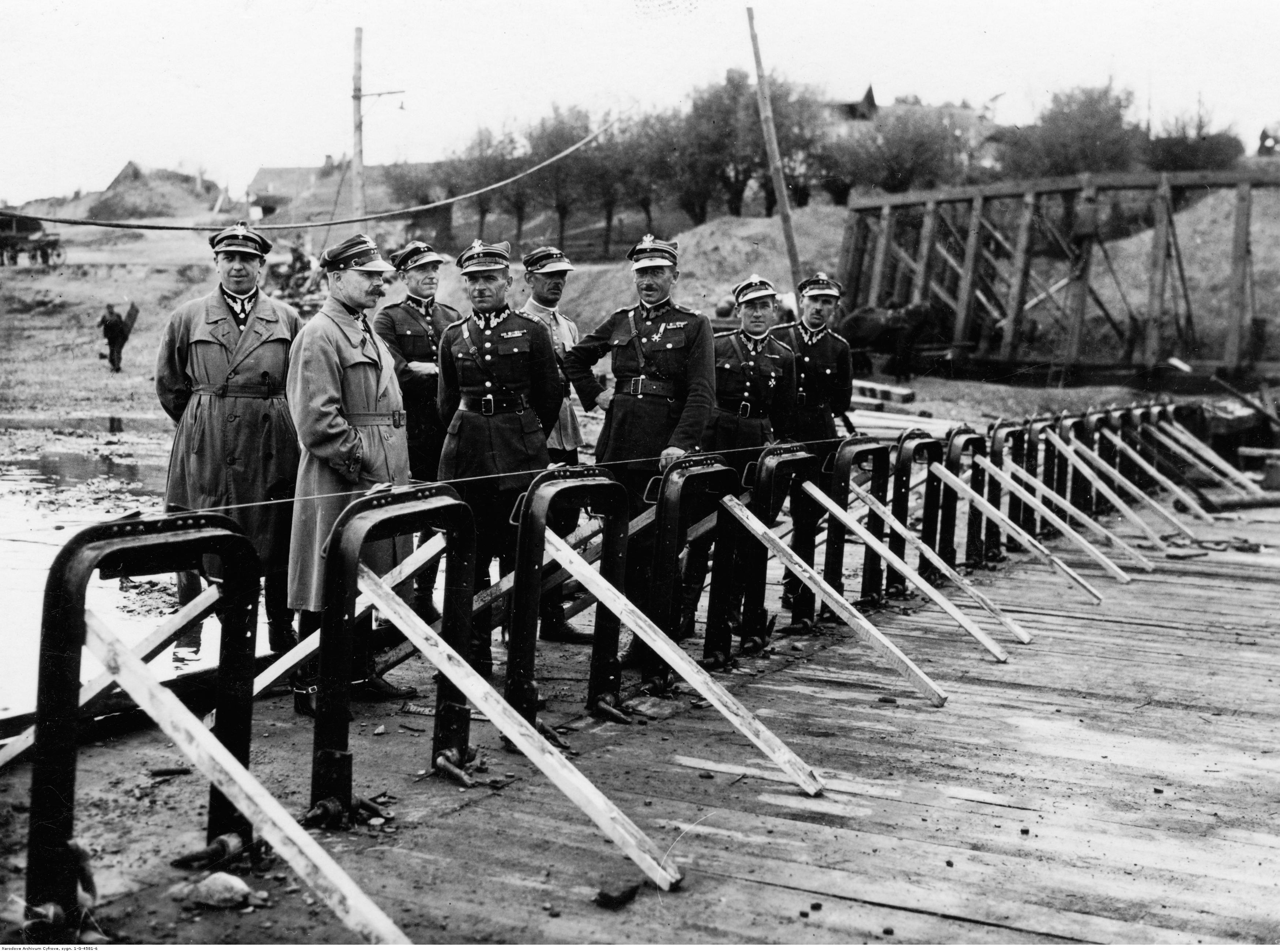 Budowa jazu na Sanie. Oficerowie Korpusu Kontrolerów na jazie w towarzystwie dowódcy, ppłk. Stefana Langnera i oficerów 4 Batalionu Saperów z Przemyśla. Widoczne ramy klapowe umocnione na jazie. Koncern Ilustrowany Kurier Codzienny - Archiwum Ilustracji. Sygnatura: 1-G-4581-6